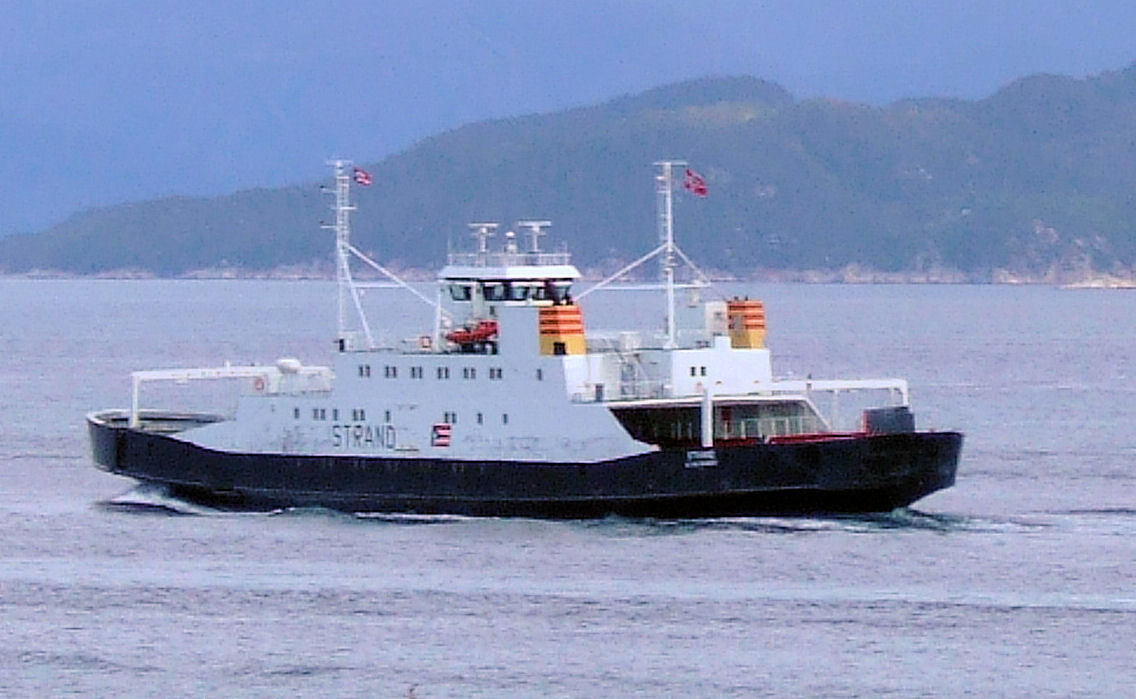 M/F Strand